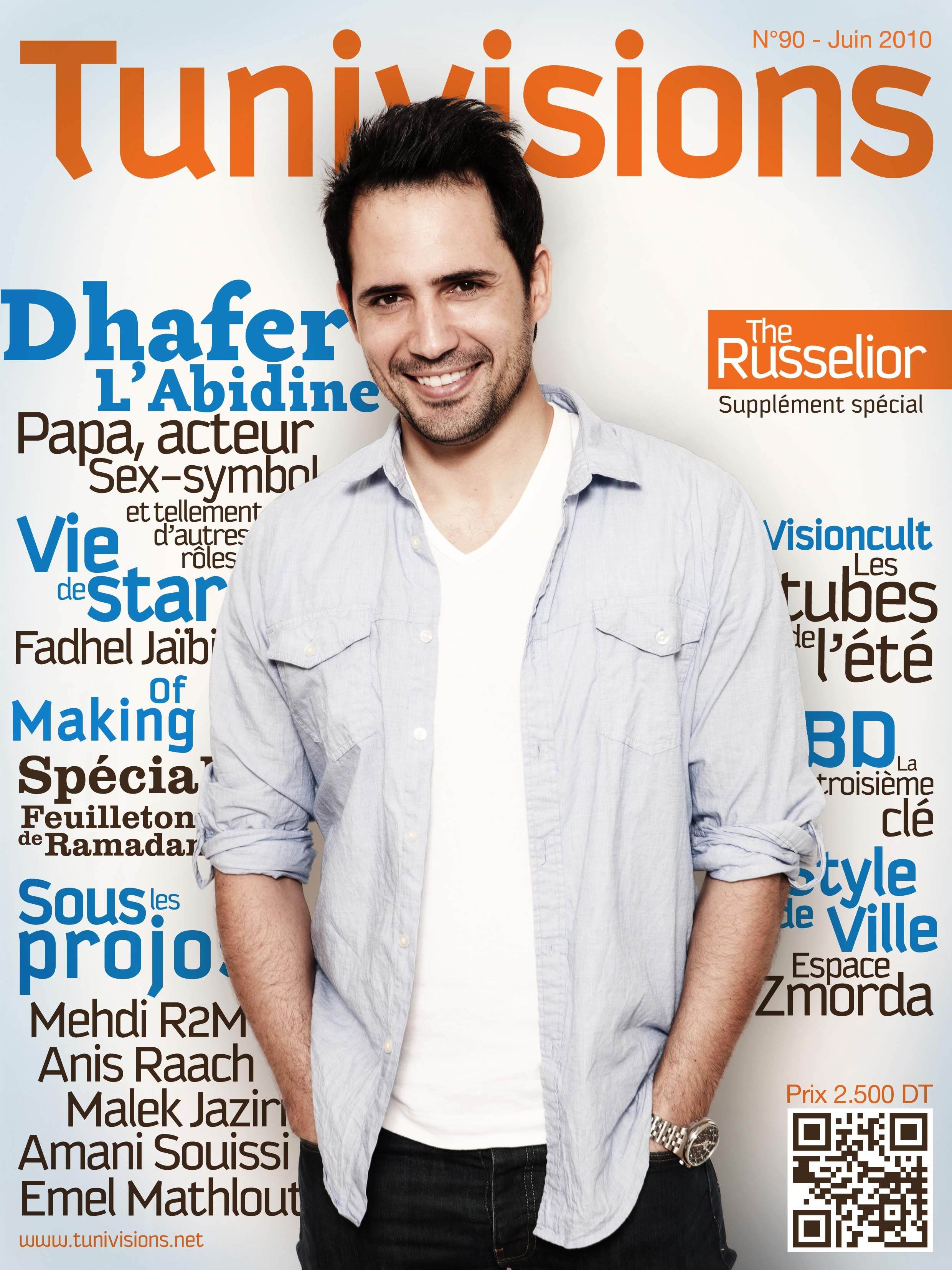 Couverture du numéro 90 du magazine tunisien Tunivisions.